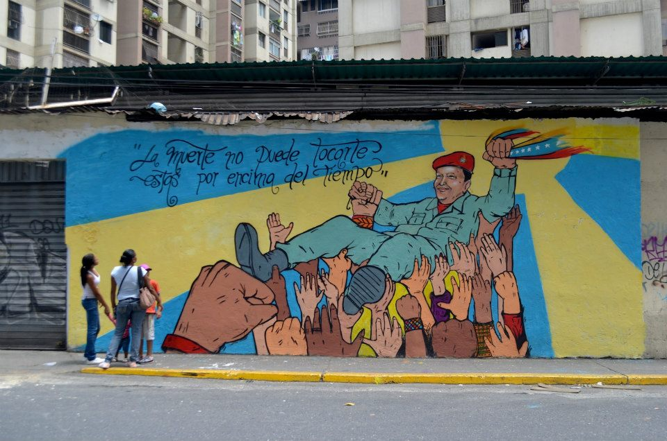 «La muerte no puede tocarte, estás por encima del tiempo». Paola Sabogal.